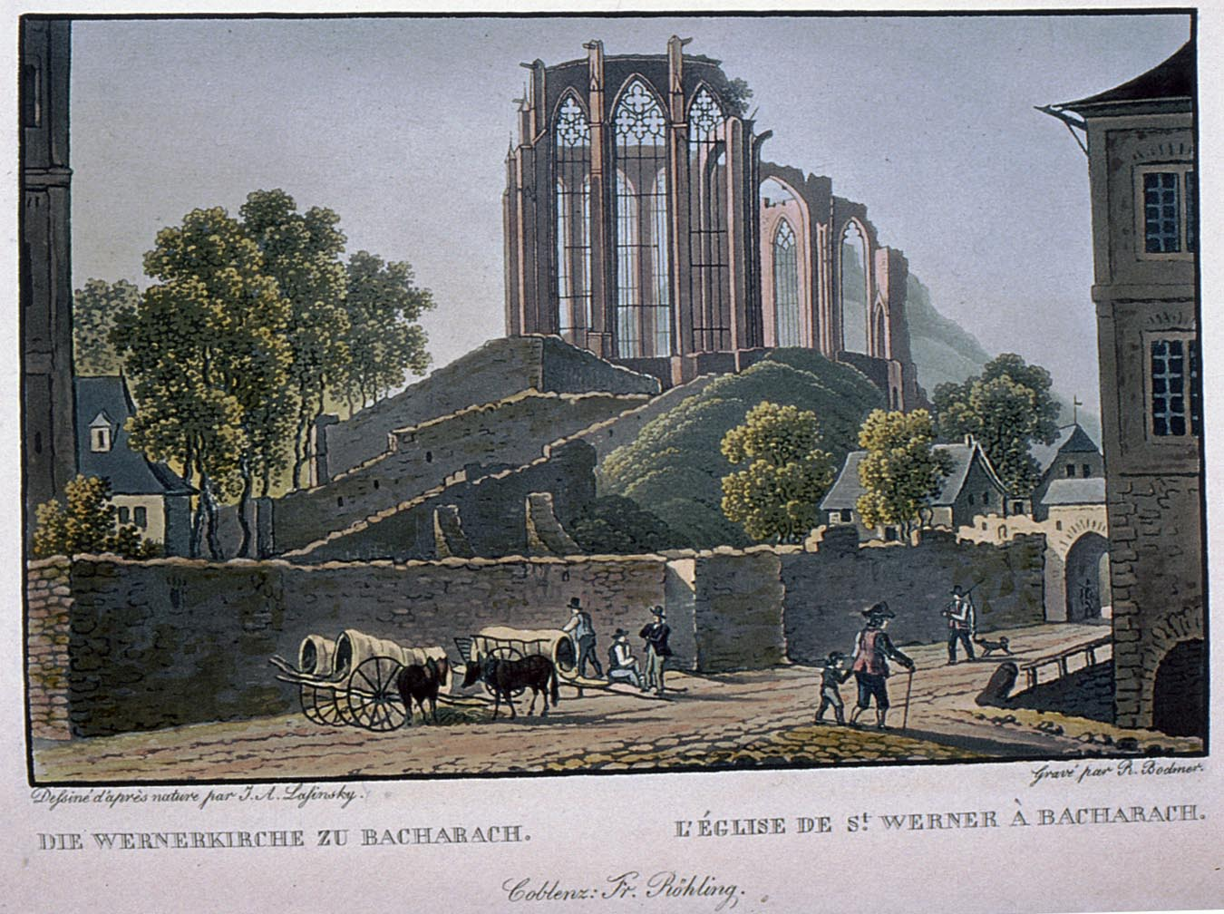 Altkolorierter Aquatintastich von R.Bodmer nach Vorlage von J.A. Lasinsky